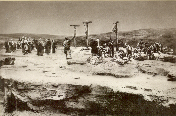 Foto des Jerusalem-Rundgemäldes mit der Kreuzigung Christi von Bruno Piglhein - Bild 5 von 10